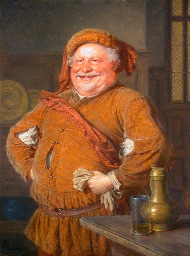 Eduard von Grützner: Falstaff mit Handschuhen, Zinnkanne und Weinglas